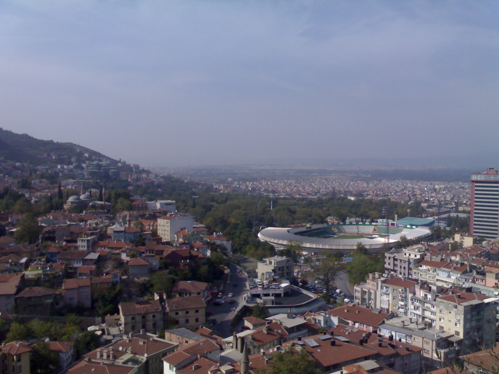 Bursa Atatürk Stadı ve şehrin batı yakası